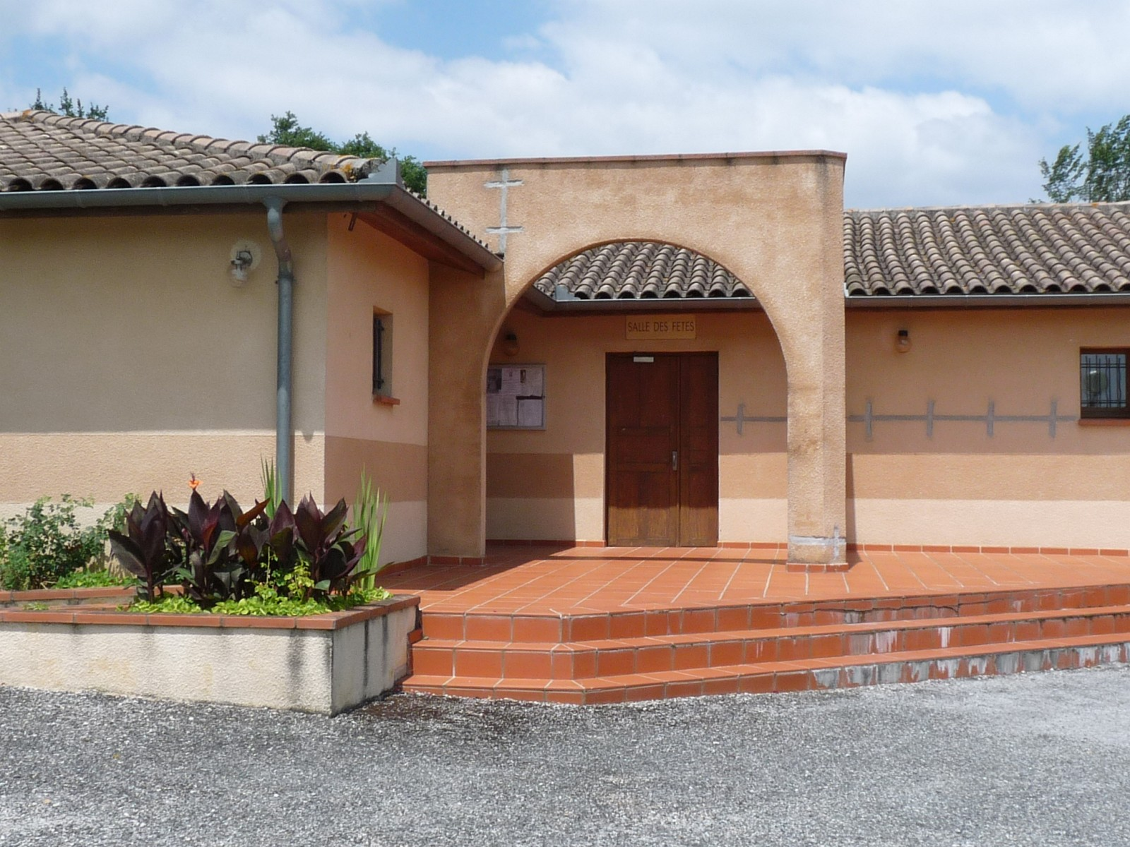 Salle des fêtes, Francarville, Haute-Garonne, France